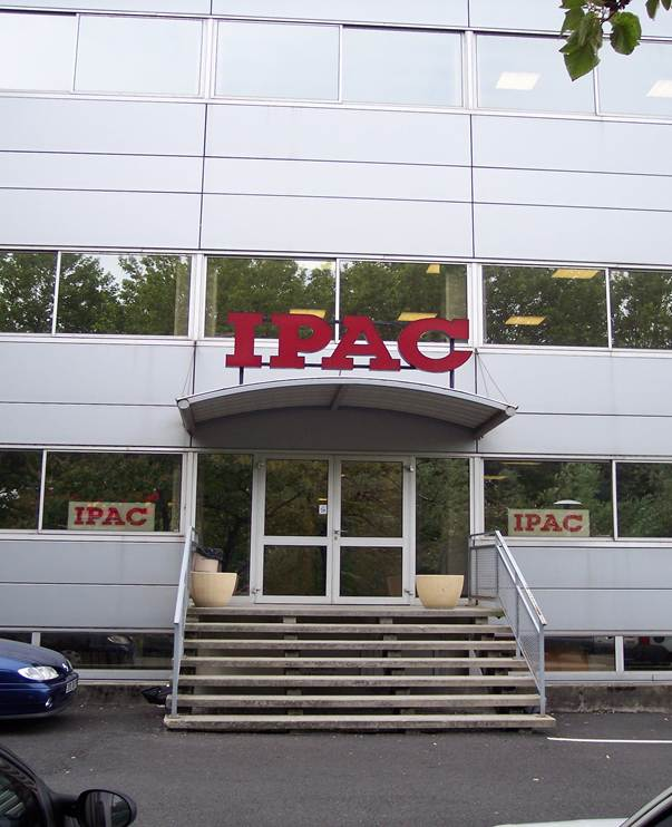 Entrée Ipac Chambéry